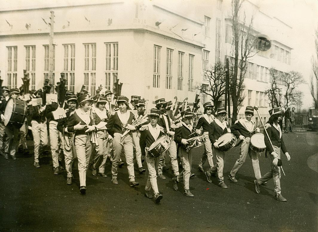 Orkiestra szkolna „Szalamaje” w latach 70-tych krocząca ulicami miasta. Tomaszów Mazowiecki w woj.łódzkim. PL,EU.CC0